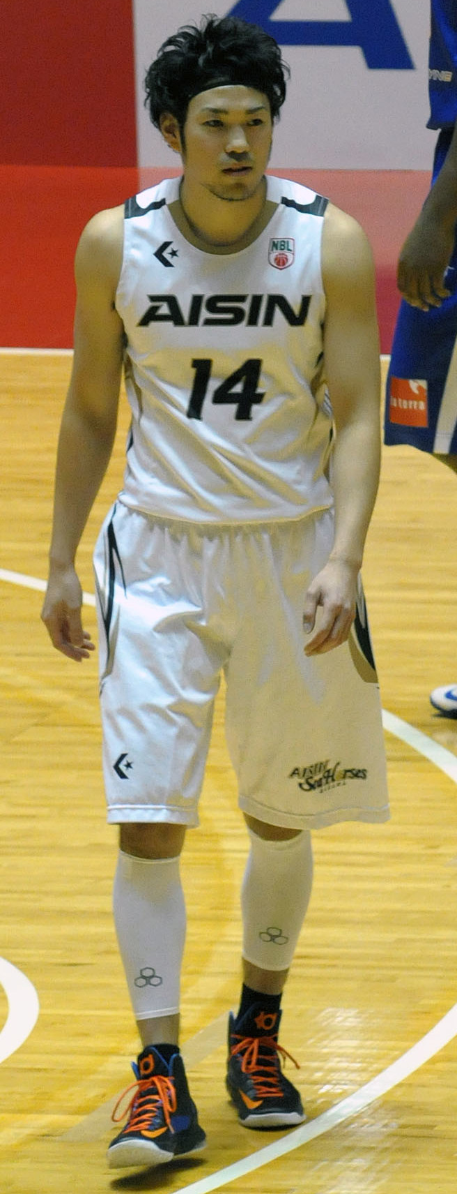 アイシンシーホース三河、金丸晃輔選手。代々木第一体育館で。